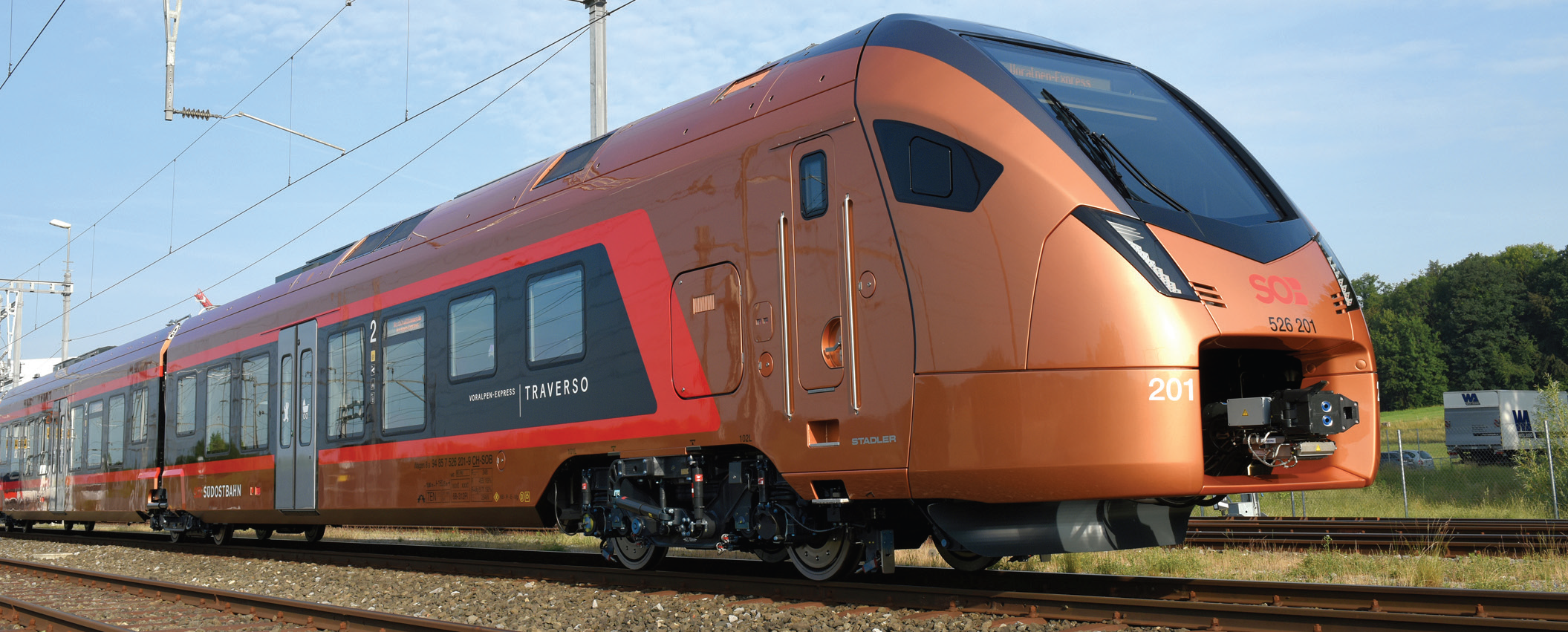 Der Flirt «Traverso» Schweizerische Südostbahn (SOB) wird ab Fahrplanwechsel 2019/2020 als Voralpen-Express auf der Strecke zwischen St. Gallen und Luzern verkehren. Die achtteiligen Züge sind kupferfarben und verfügen über 359 Sitzplätze, davon 68 Plätze in der 1. Klasse. Die Motordrehgestelle wurden komplett neu entwickelt und die Laufdrehgestelle optimiert.